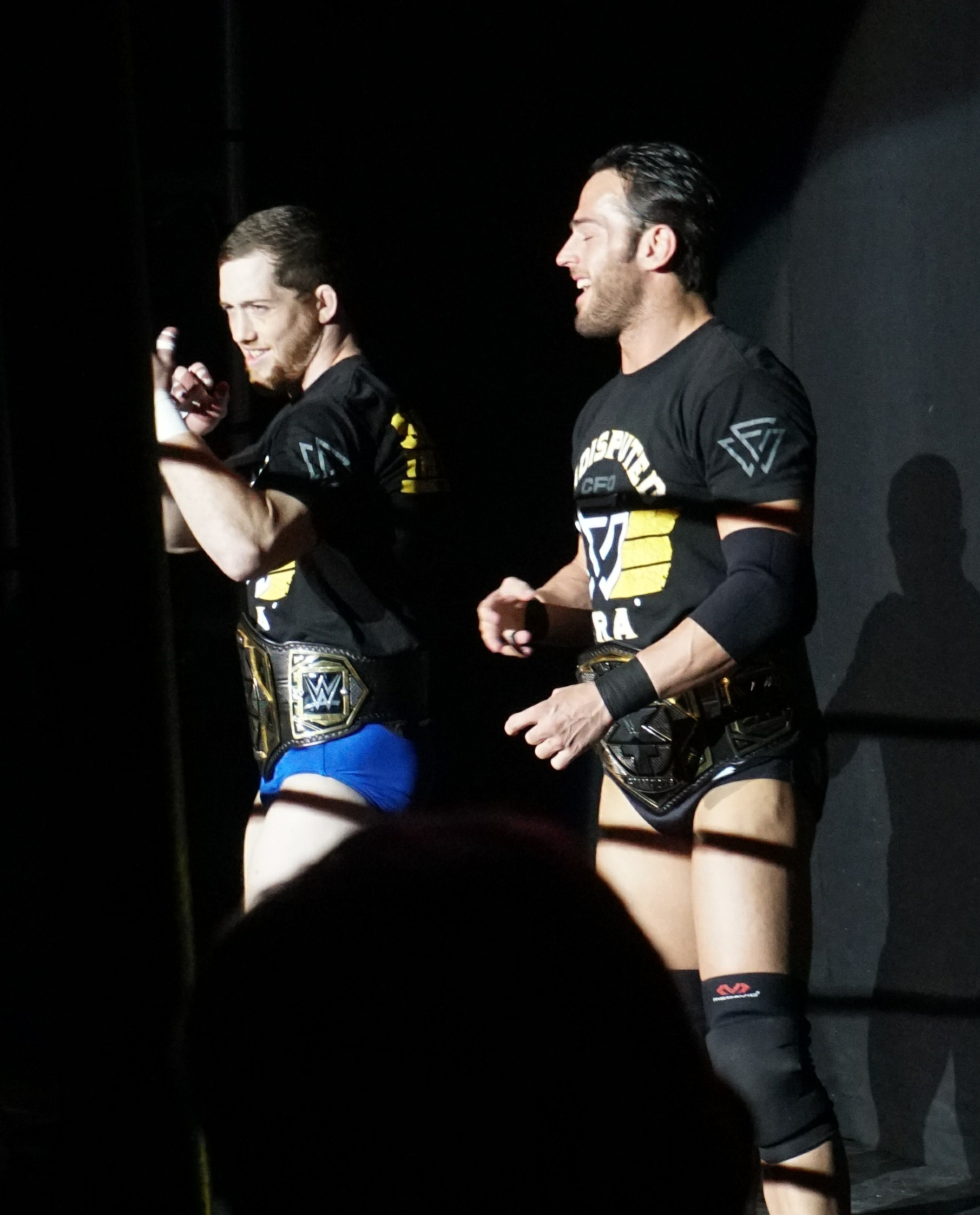 WWE Live 2018 - Antwerpen (NxT) - Kyle O'Reilly&Roderick Strong Vs Danny Burch&Oney LorcanKyle O'Reilly (c)&Roderick Strong (c) def. (Pin) Danny Burch&Oney LorcanFor : NXT Tag Team Titles (No Title Change)( Bonne nouvelle pour les inconditionnels du catch en Belgique : le mardi 12 juin 2018, les superstars de NXT donneront le meilleur d'eux-memes au Stadsschouwburg Antwerpen, lors d'un show exclusif au Benelux.WWE NXT est une emission televisee creee en 2010, durant laquelle de jeunes catcheurs sont formes par des veterans comme Chris Jericho et C.M. Punk. Tous partagent le meme reve : devenir la nouvelle star du catch. Le programme WWE NXT a tres vite rencontre un enorme succes. Aujourd'hui, WWE NXT est connu comme une veritable machine a talents. Pensez par exemple a Seth Rollins, qui etait encore chez nous pas plus tard que l'annee derniere pour WWE Live.Cette annee encore, vous aurez la chance de voir a l'oeuvre de nombreux nouveaux talents du catch ! A l'affiche, on trouve notamment Aleister Black, Adam Cole, Undisputed Era, Velveteen Dream, Ricochet, Nikki Cross, Shayna Baszler et Kairi Sane. Le line-up reste sujet a des changements de derniere minute.Attendez-vous a un show sensationnel et plein de tension !